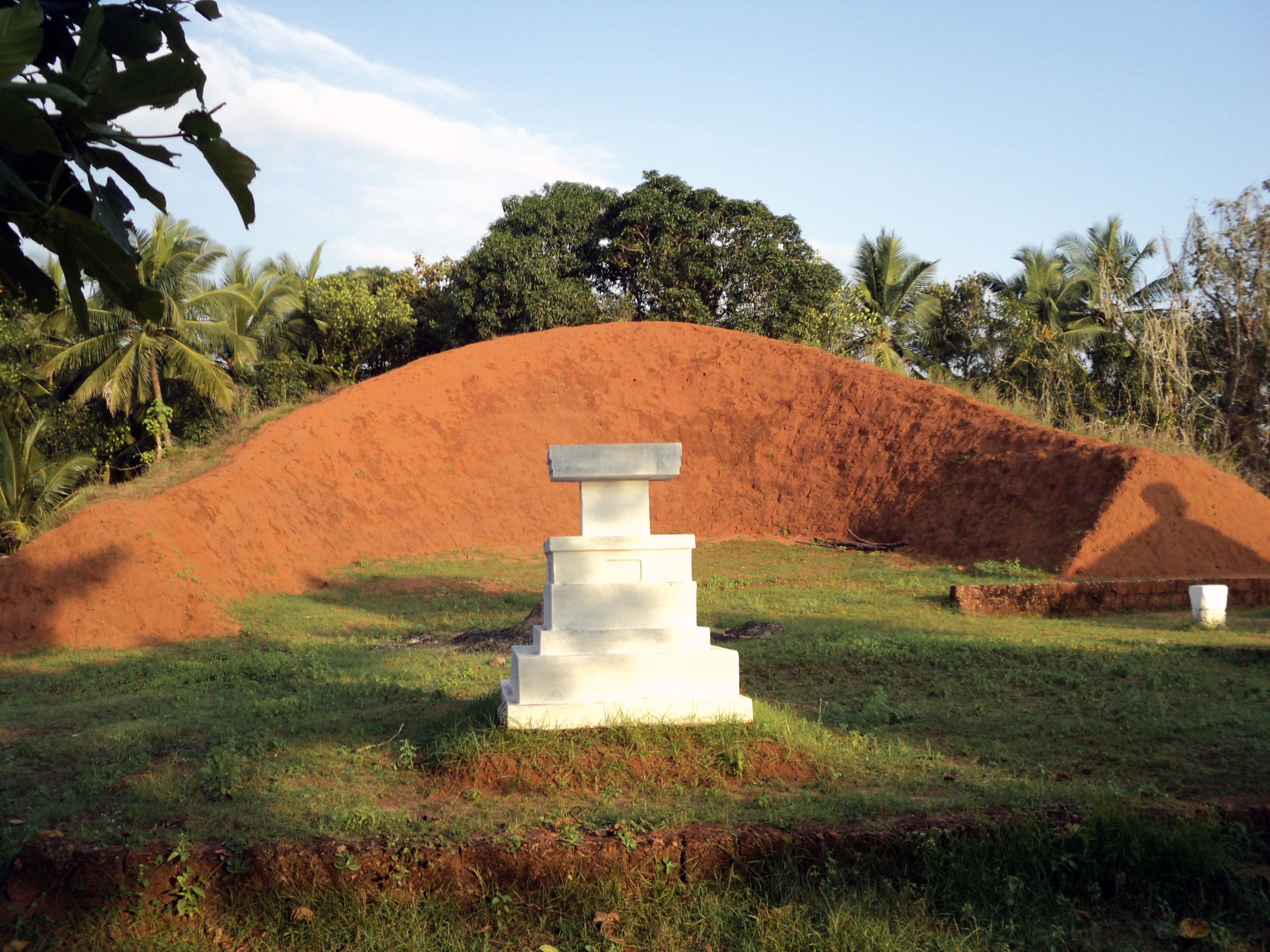 ചെറുവത്തൂർ കൊവ്വലിൽ വീരഭദ്രക്ഷേത്രത്തിനു സമീപമുള്ള ഇഡു